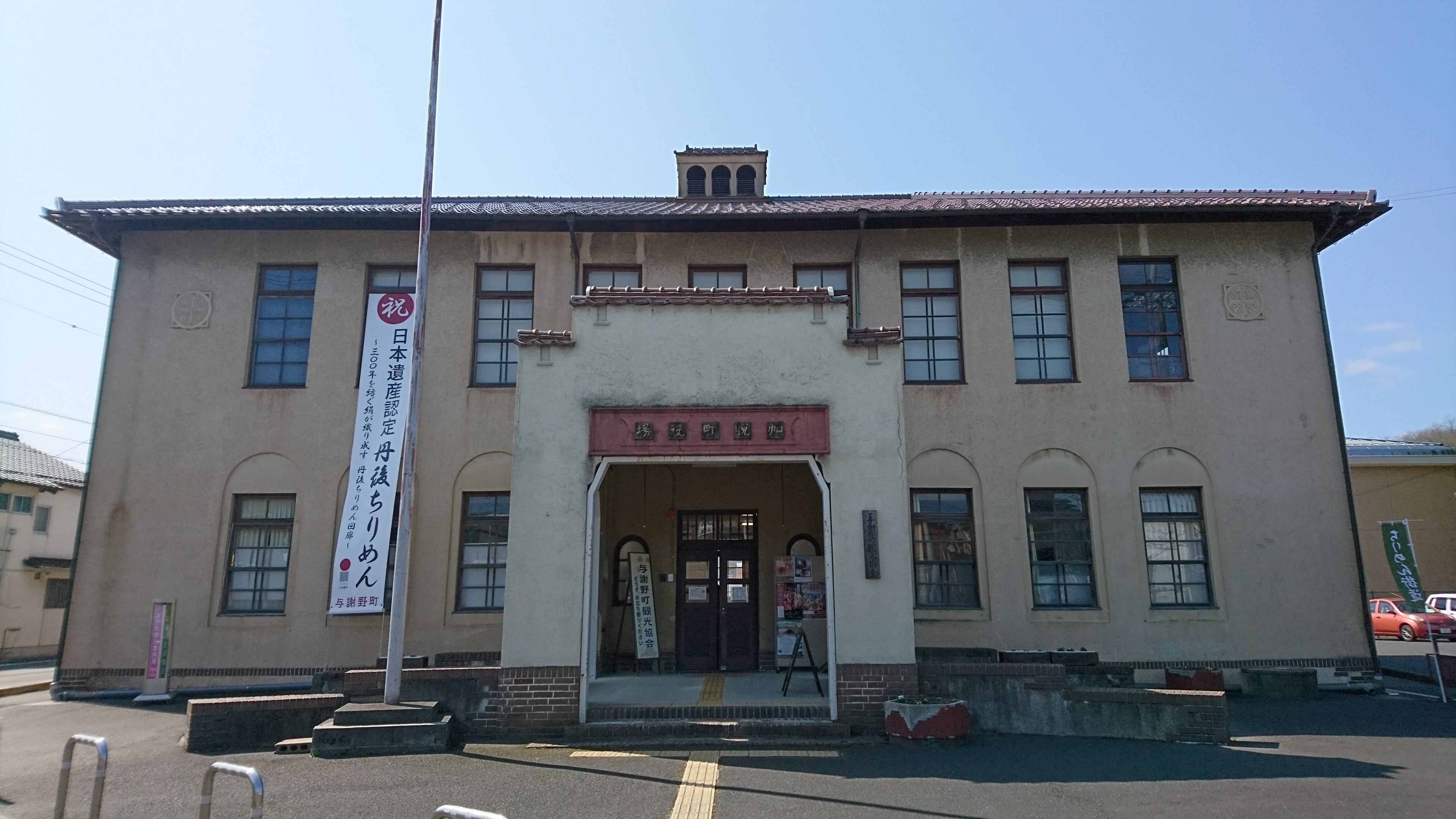 京都府与謝郡与謝野町を構成する3町のひとつ、旧加悦町の町役場。日本遺産・丹後ちりめん回廊を構成する文化財の一つ。